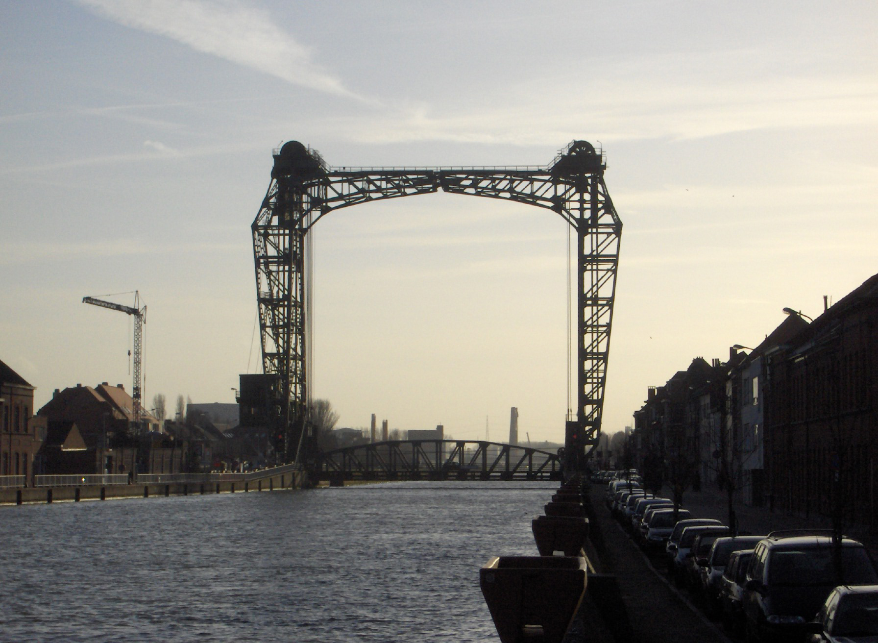 "Brug der zuchten" centrum Willebroek. Eigen opname